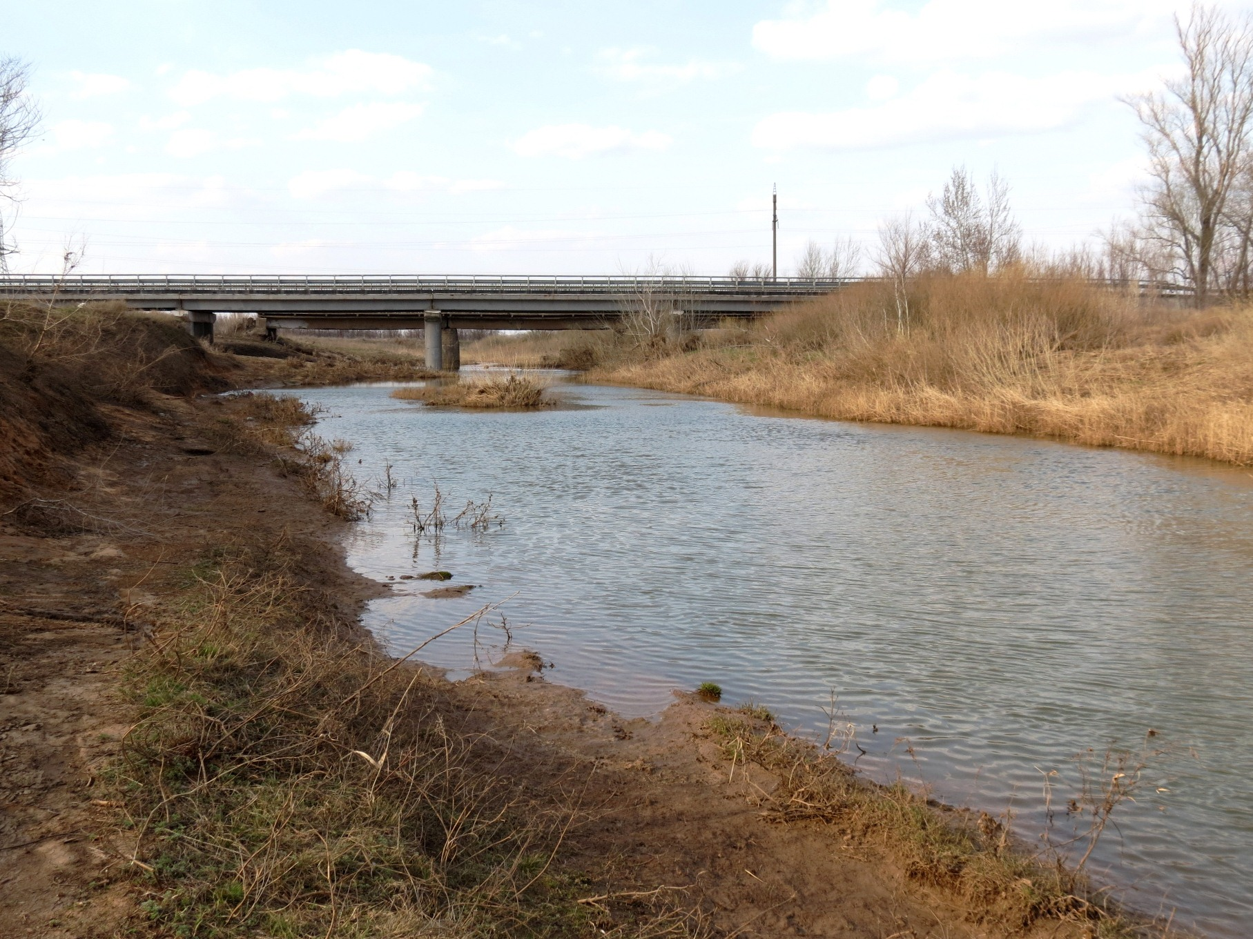 Река Бердянка у моста на трассе Оренбург-Беляевка